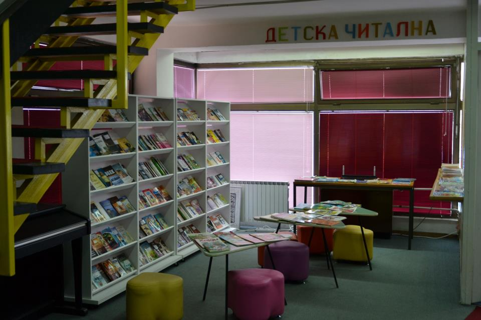 Билбиотека